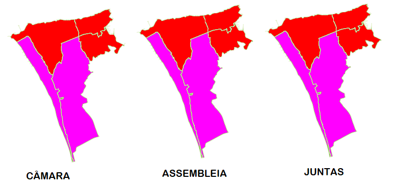 Mapa ilustrativo do partido mais votado por Freguesia em Almada